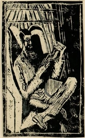 Treball en fusta de Dora Carrington per Lytton Strachey. Format ex-libris.